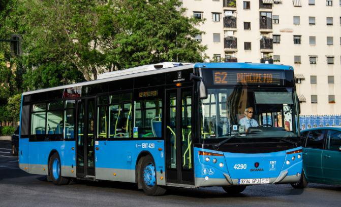 El lunes 25 de febrero tres líneas de EMT amplian su recorrido para mejorar el servicio ofrecido a los usuarios. Los cambios benefician a las líneas 62 (Príncipe Pío-Los Puertos), 73 (Diego de León-Canillas) y 161 (Moncloa-Estación de Aravaca). Plaza de Cristo Rey será la nueva cabecera de la línea 62 sustituyendo a Príncipe Pío; la línea 73 llegará hasta la Feria de Madrid, más allá de Canillas, y los vecinos de Aravaca verán cómo la línea 161 se prolonga a lo largo de la avenida del Talgo.